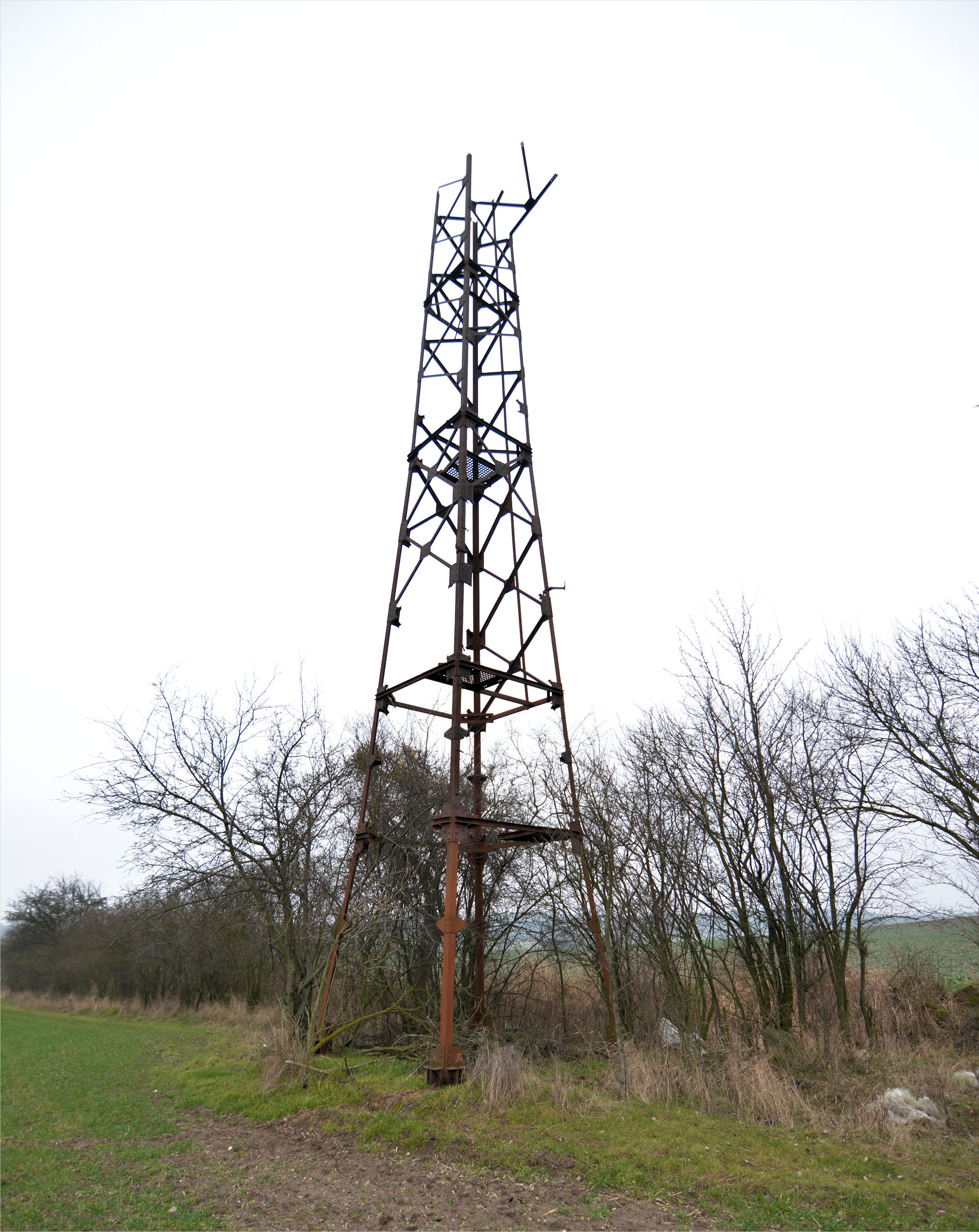 Dawna latarnia lotnicza w Czachowie (gm. Cedynia)